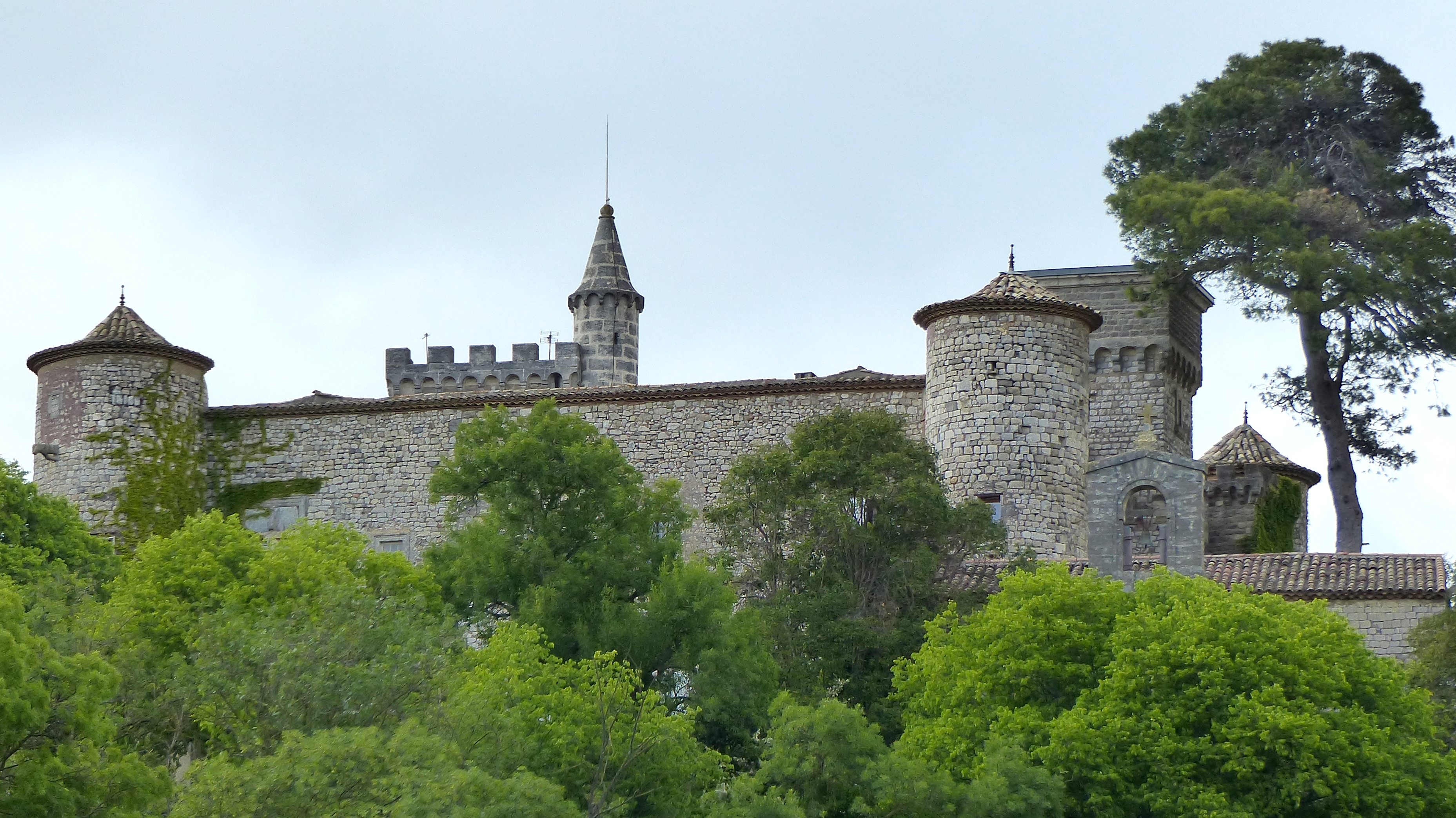 Montarnaud (Hérault, France), près de Montpellier, surplombant le vieux village, le château médiéval (12e siècle, modifié au 17e).